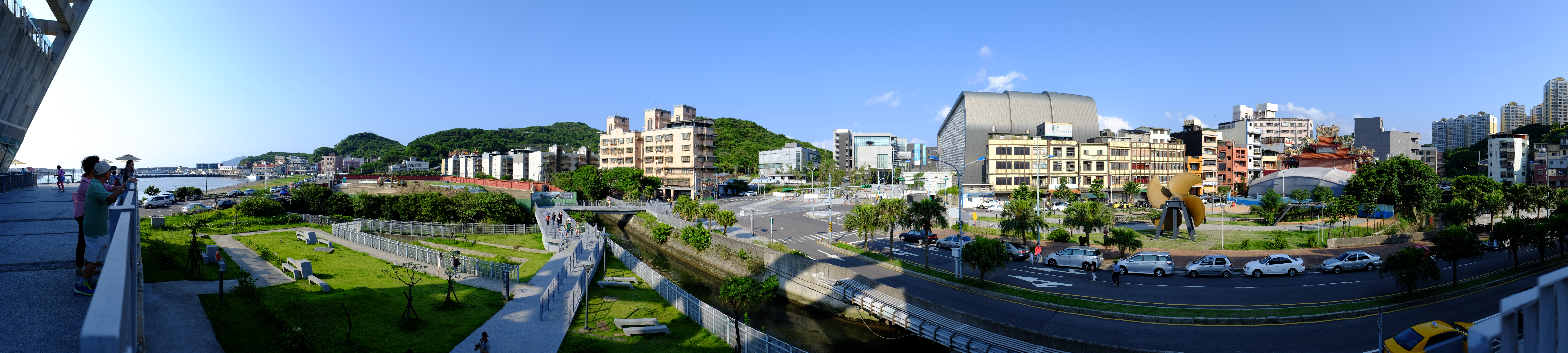 國立海洋科技博物館